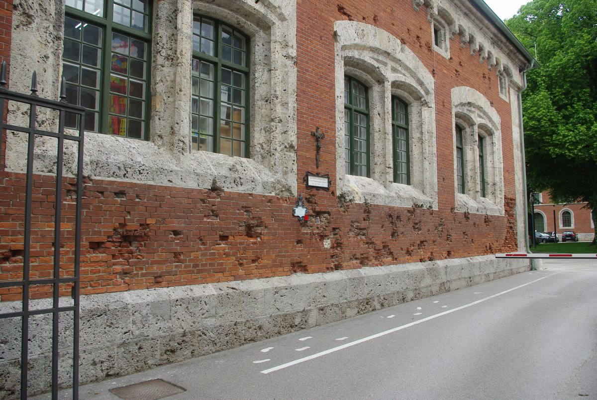 Bombenschäden von der Bombardierung am 25. April 1945 an der südlichen Zufahrt zur Alten Saline in Bad Reichenhall